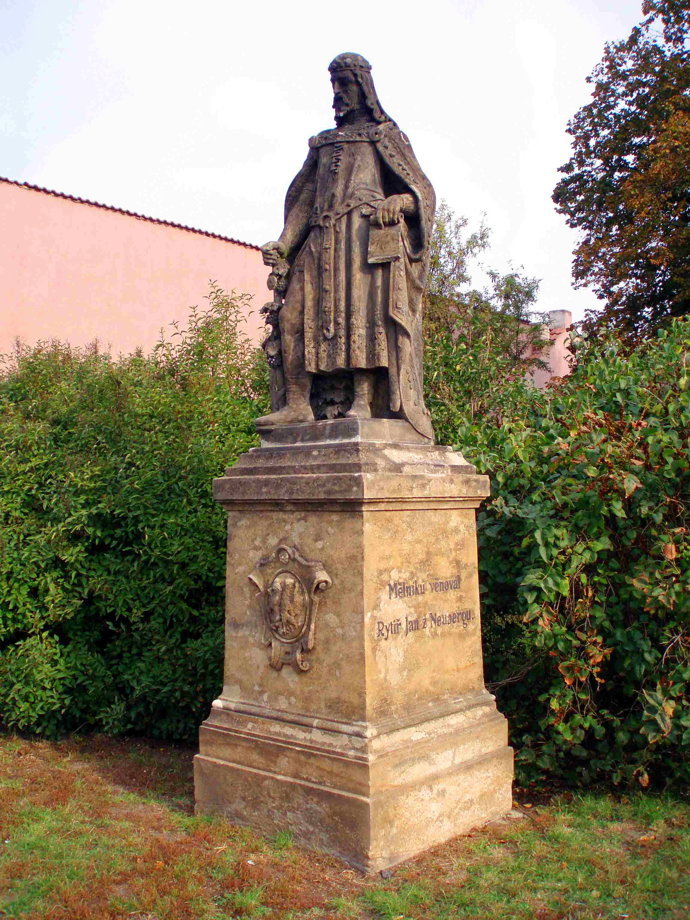 Denkmal Kaiser Karl IV. in Melnik von Josef Max, 1878